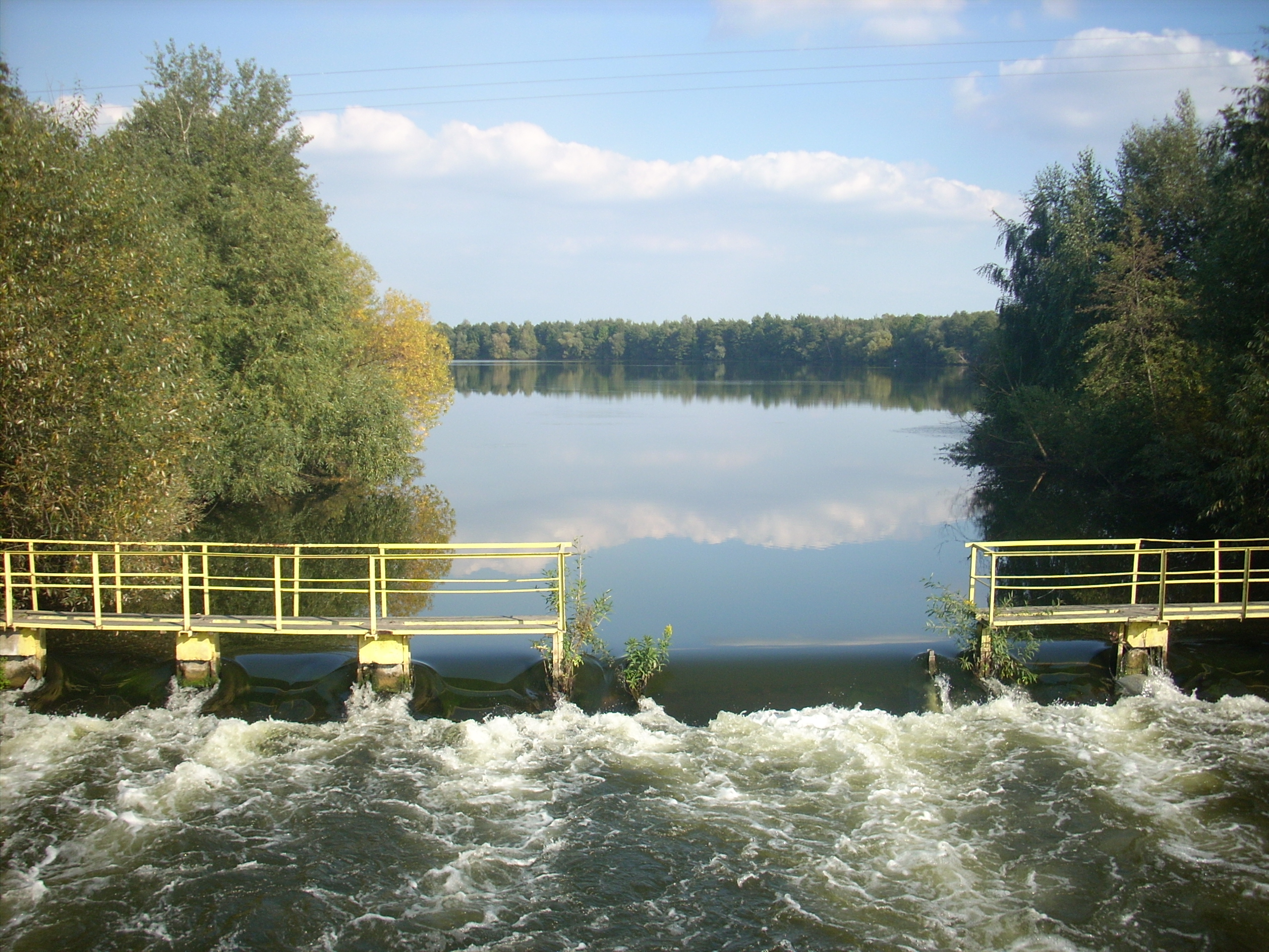 Licheńskie Lake - a weir on the canal to Pątnowskie Lake